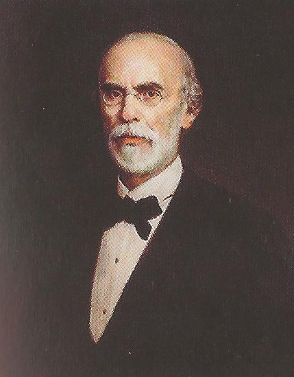 Porträt von Josef Philipp Herr (1819–1884), im Studienjahr 1866/67 Rektor des k.k. Polytechnischen Institutes Wien